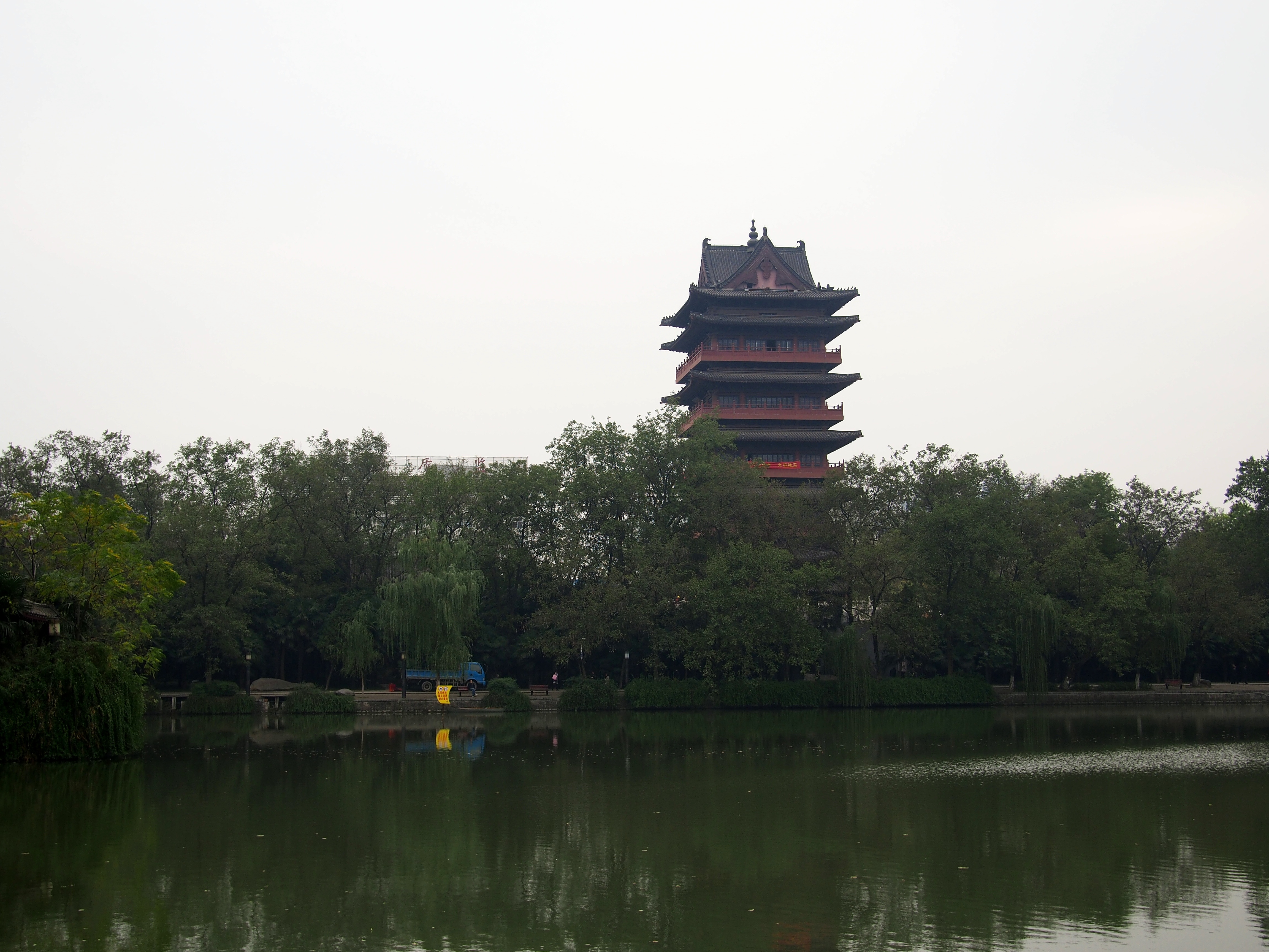 清风阁 - Qingfeng Pavilion - 2014.11